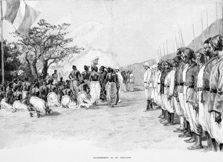 Couronnement du roi Agoliagbo